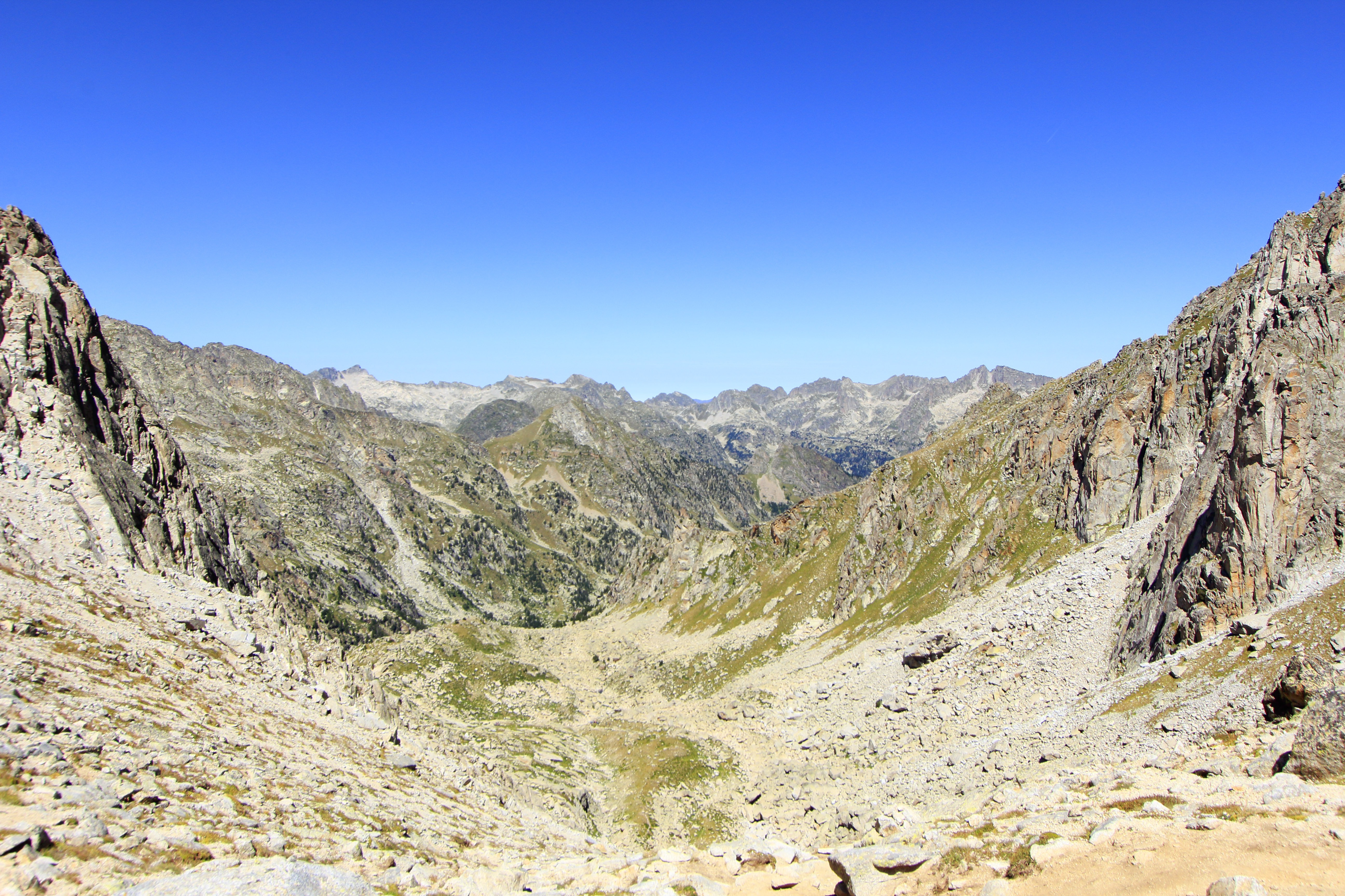 La tartera de l'espatlla de Monestero des de la Collada de Monestero (Pallars Sobirà)